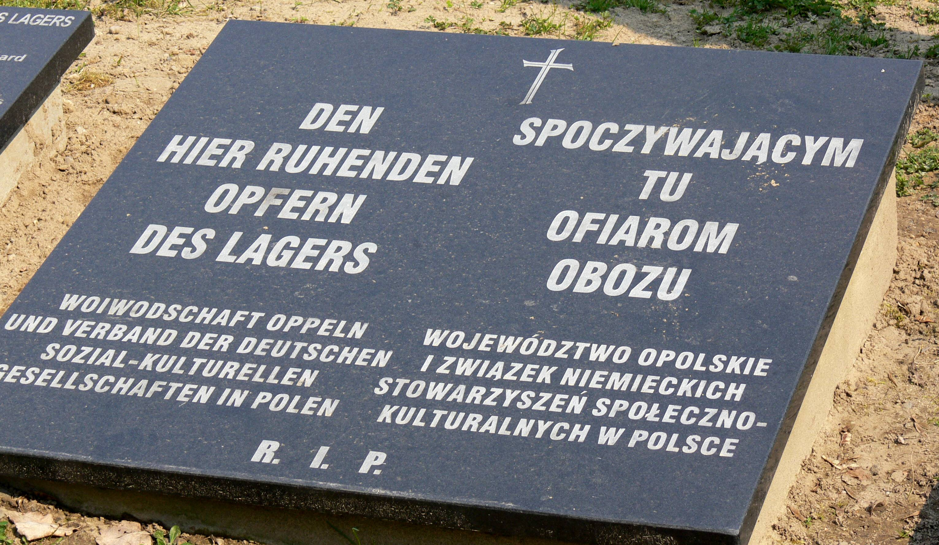 Haupttafel auf dem Lagerfriedhof in Lambinowice